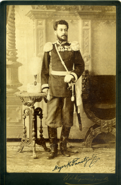 Коста Паница